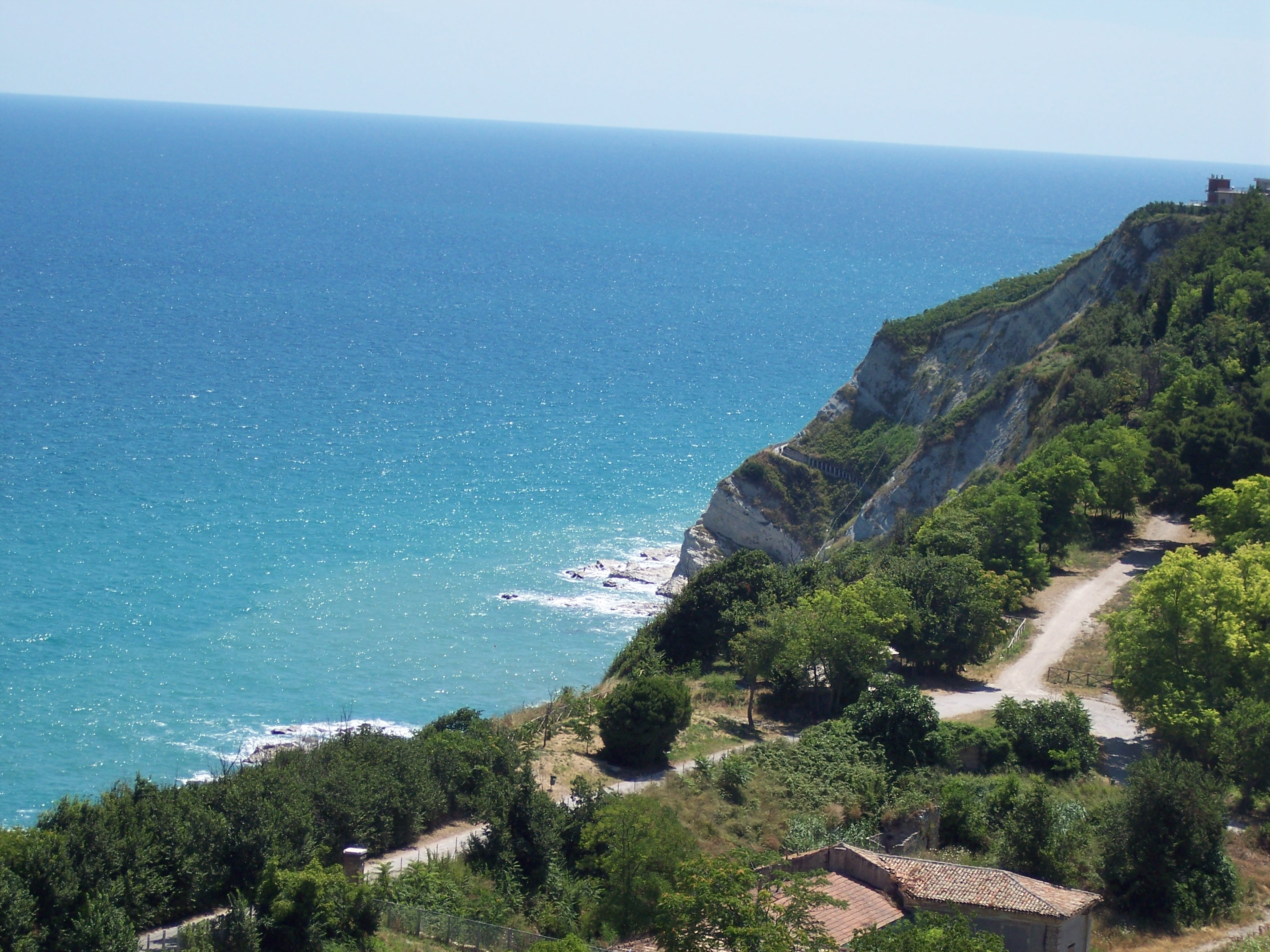 Parco del Cardeto